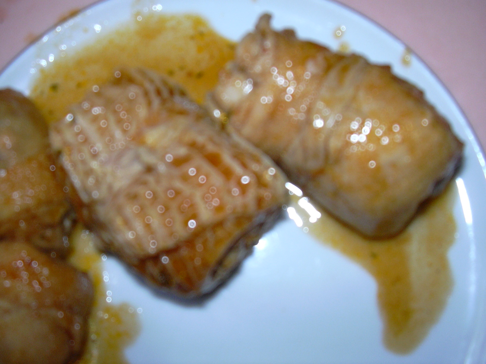 tripoux aveyron